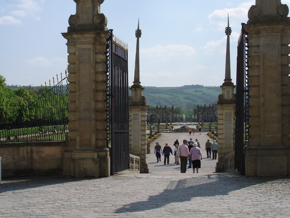 Blick zur Orangerie und die Steinriegel des Taubertals